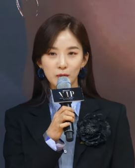 25일 오후 서울시 양천구 목동 SBS에서 새 월화드라마 'VIP'의 제작발표회가 열려 이정림 PD와 배우들이 참석해 단체 포토타임을 갖고 있다.